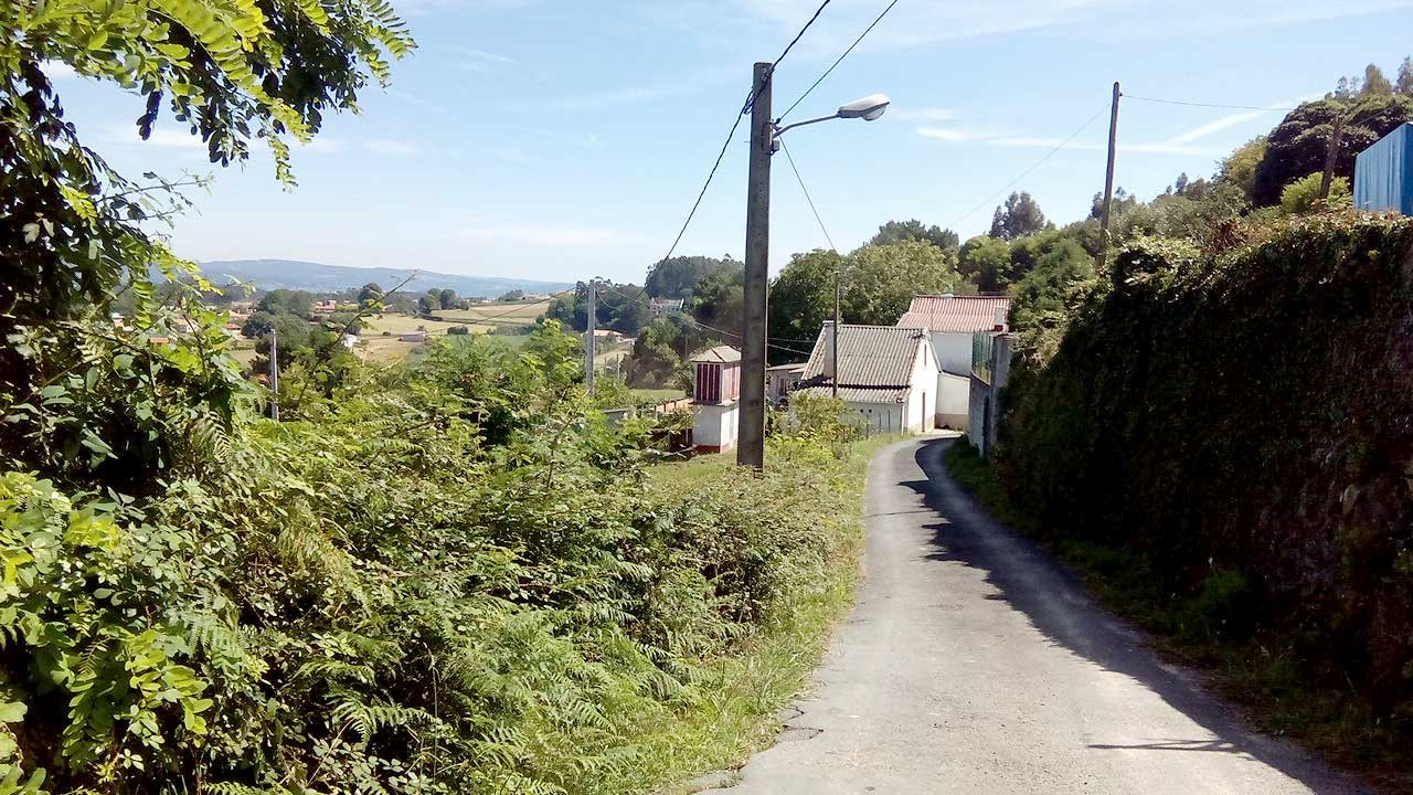 Vista dos Vilares, O Val.